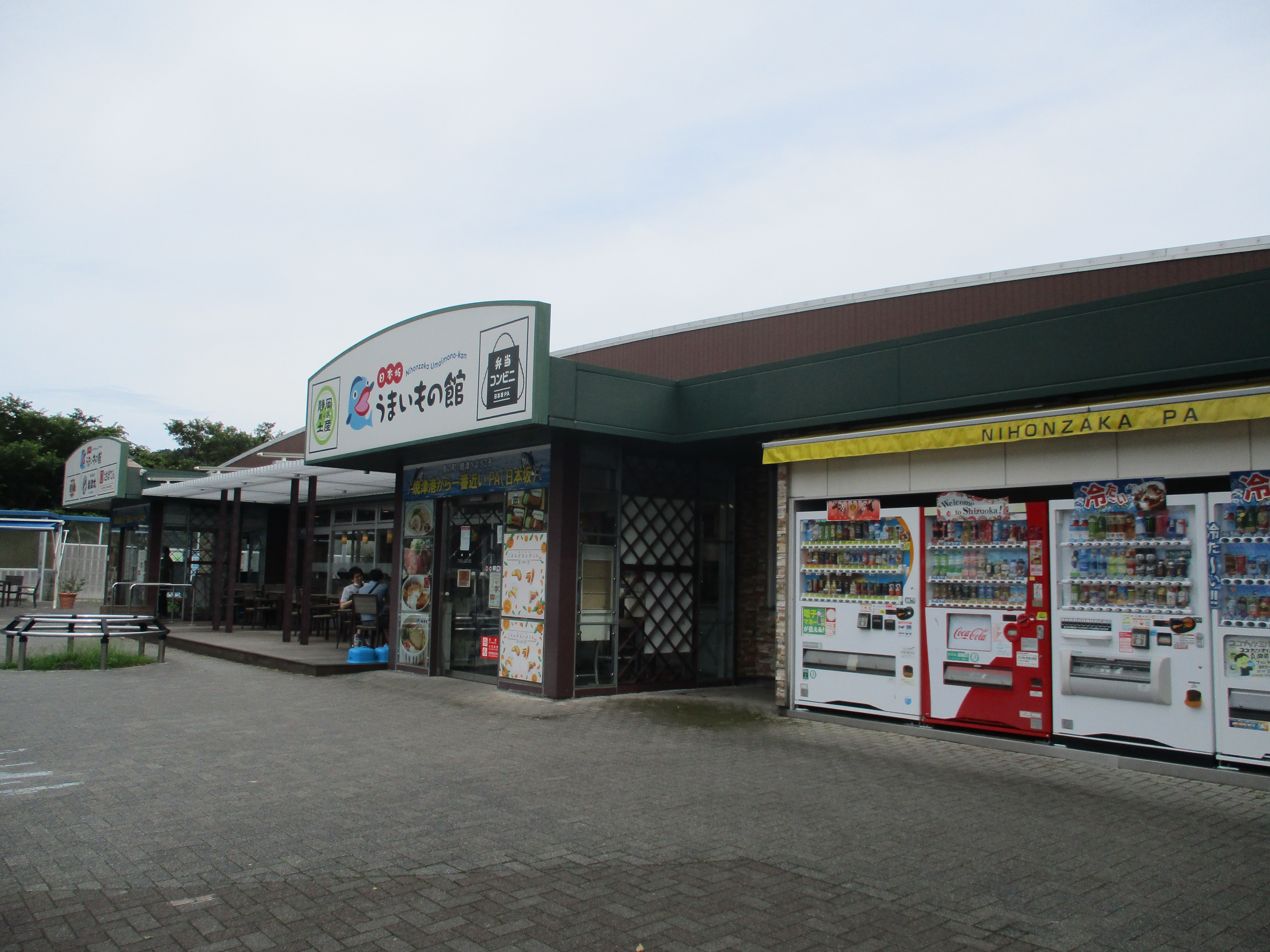 静岡県焼津市、日本坂パーキングエリア下り